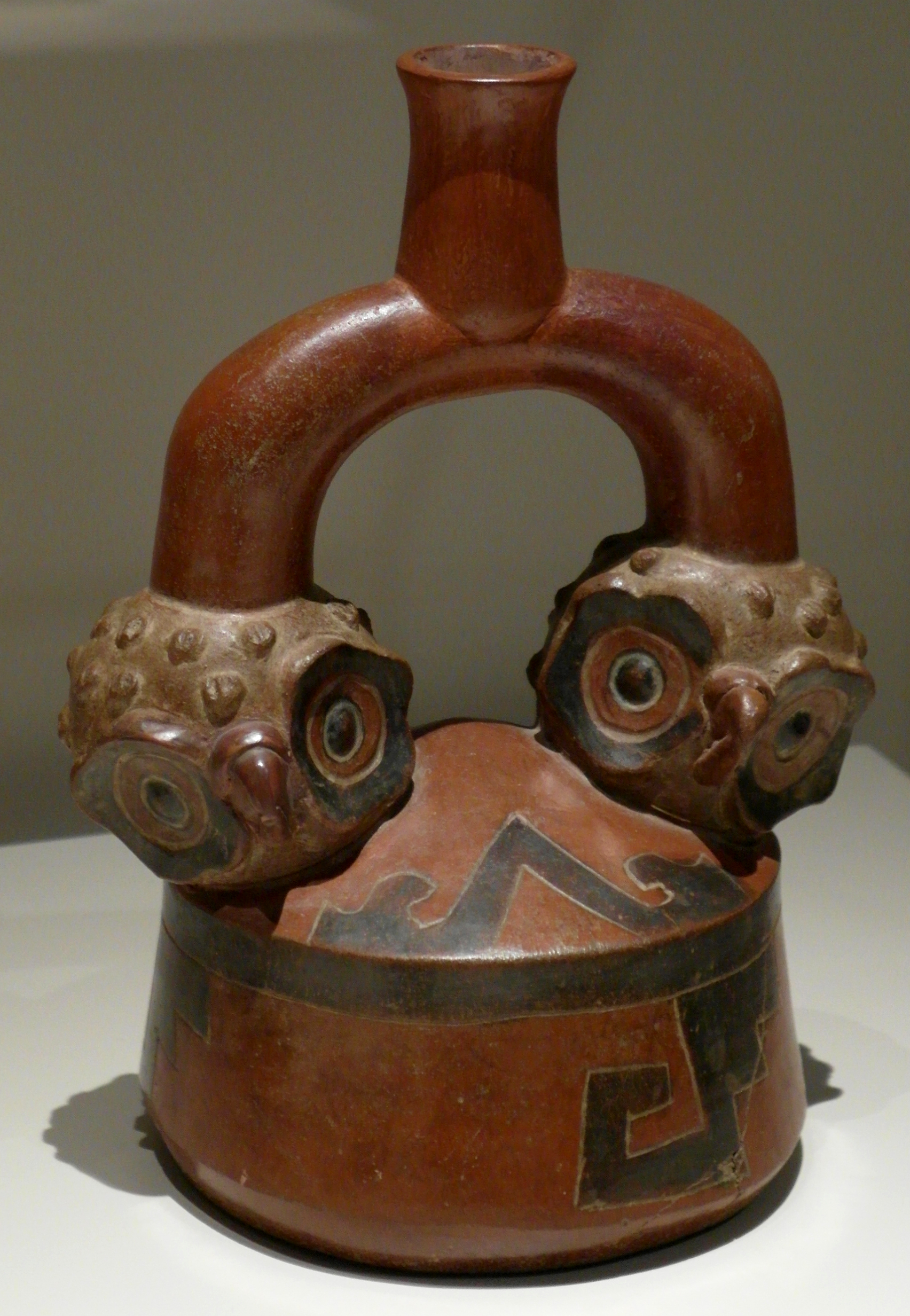 Recipiente ceremonial con dos cabezas de lechuza, cupisnique.